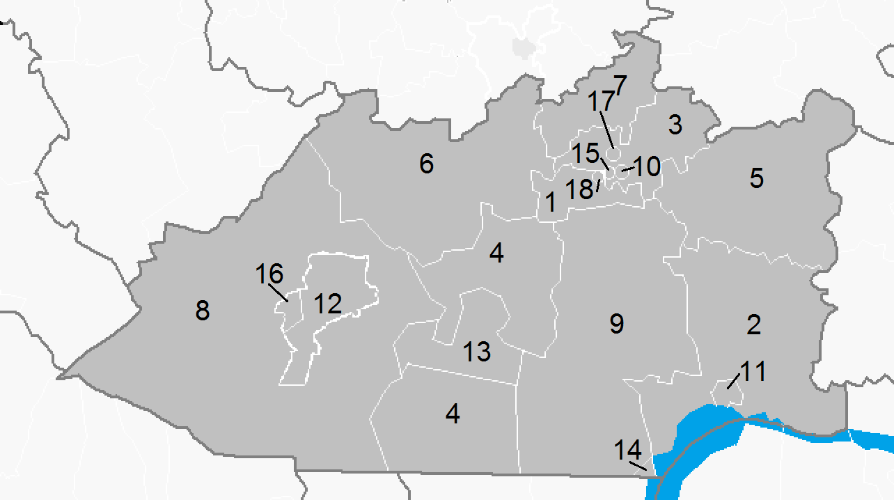 Районы и города областного значения Карагандинской области